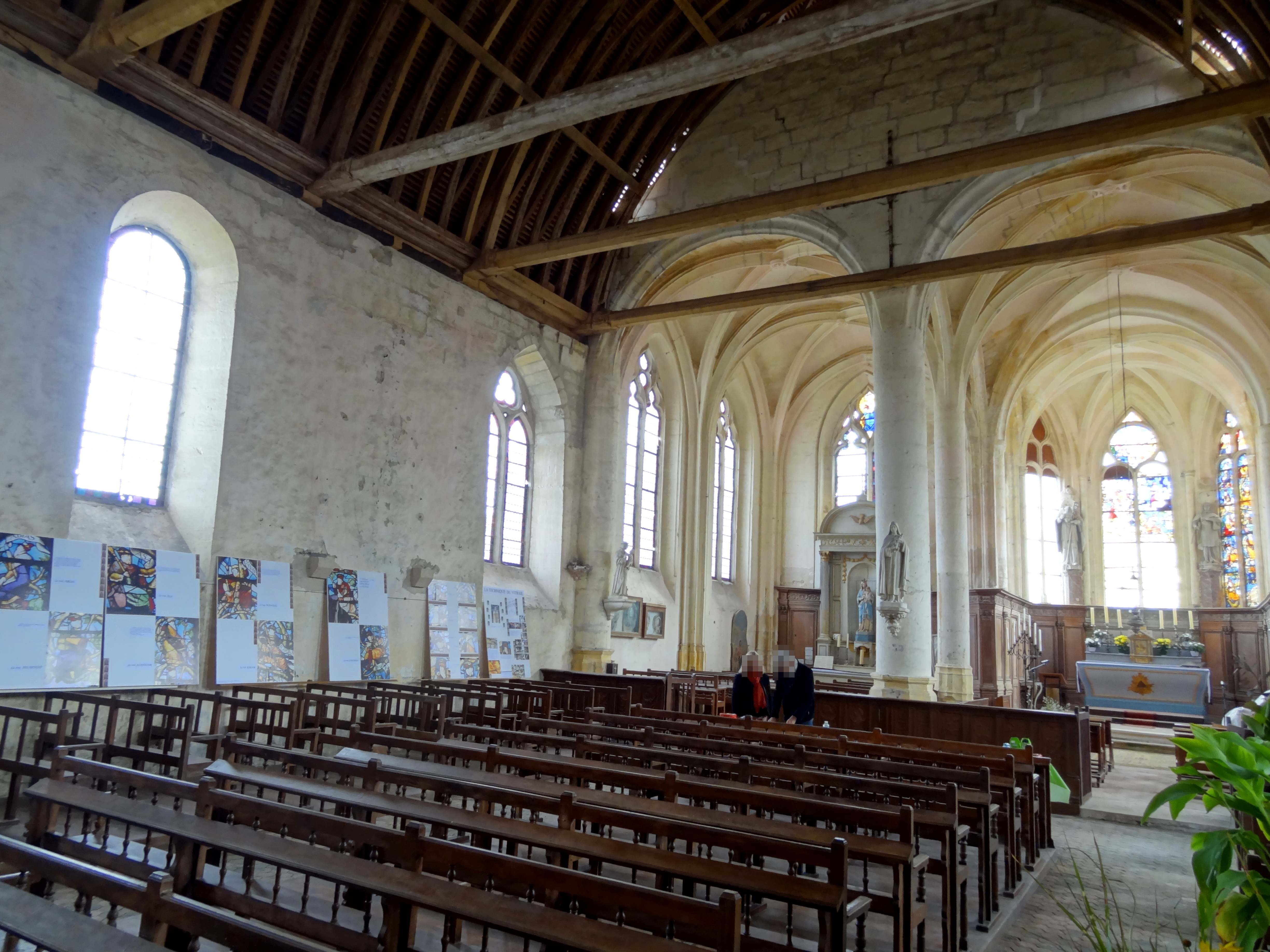 Intérieur de l'église - voir titre.